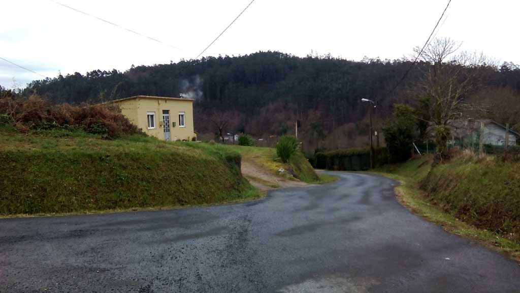 Vista das Ánimas, Doso, Narón.